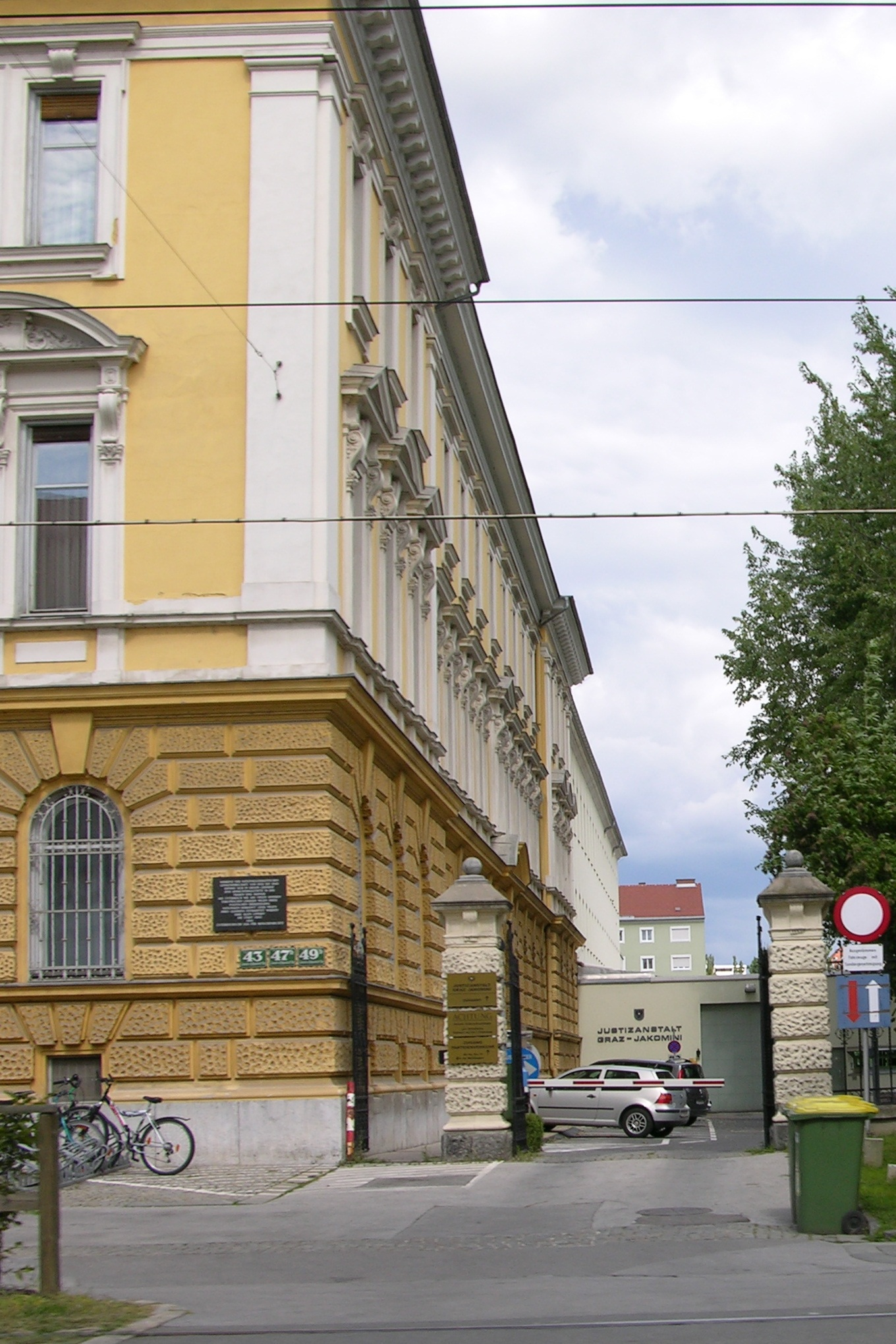 Zugang zur Justizanstalt Graz-Jakomini